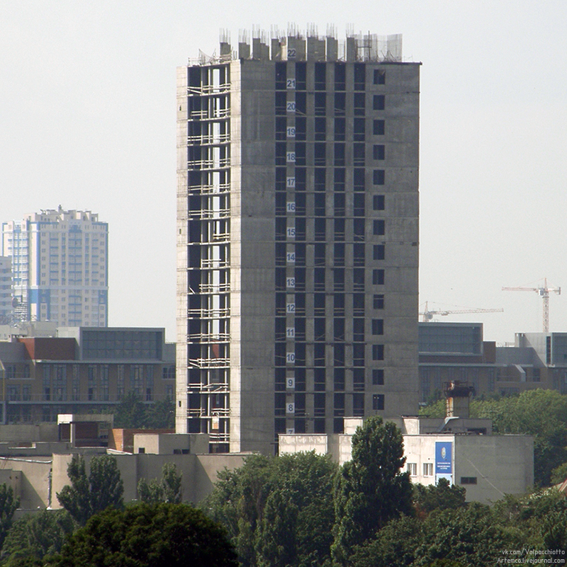 недострой НМУ